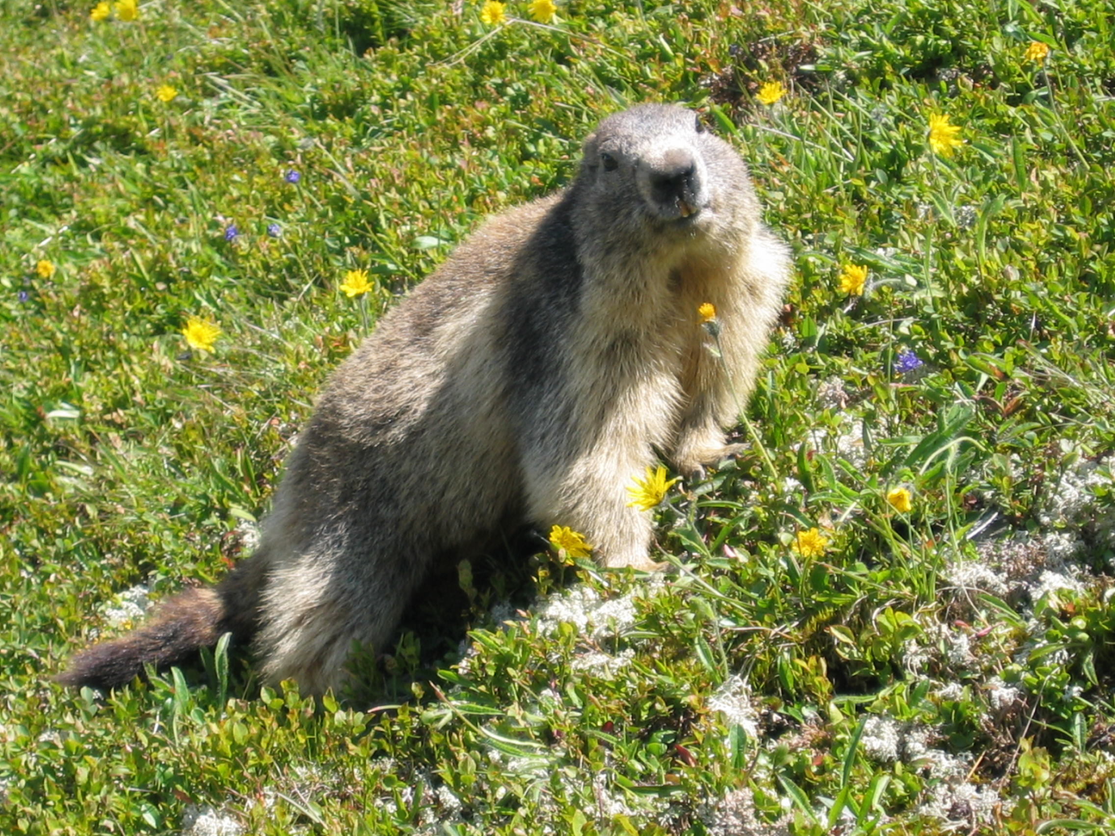 Marmotte, Chamonix, col de Balme, 2007